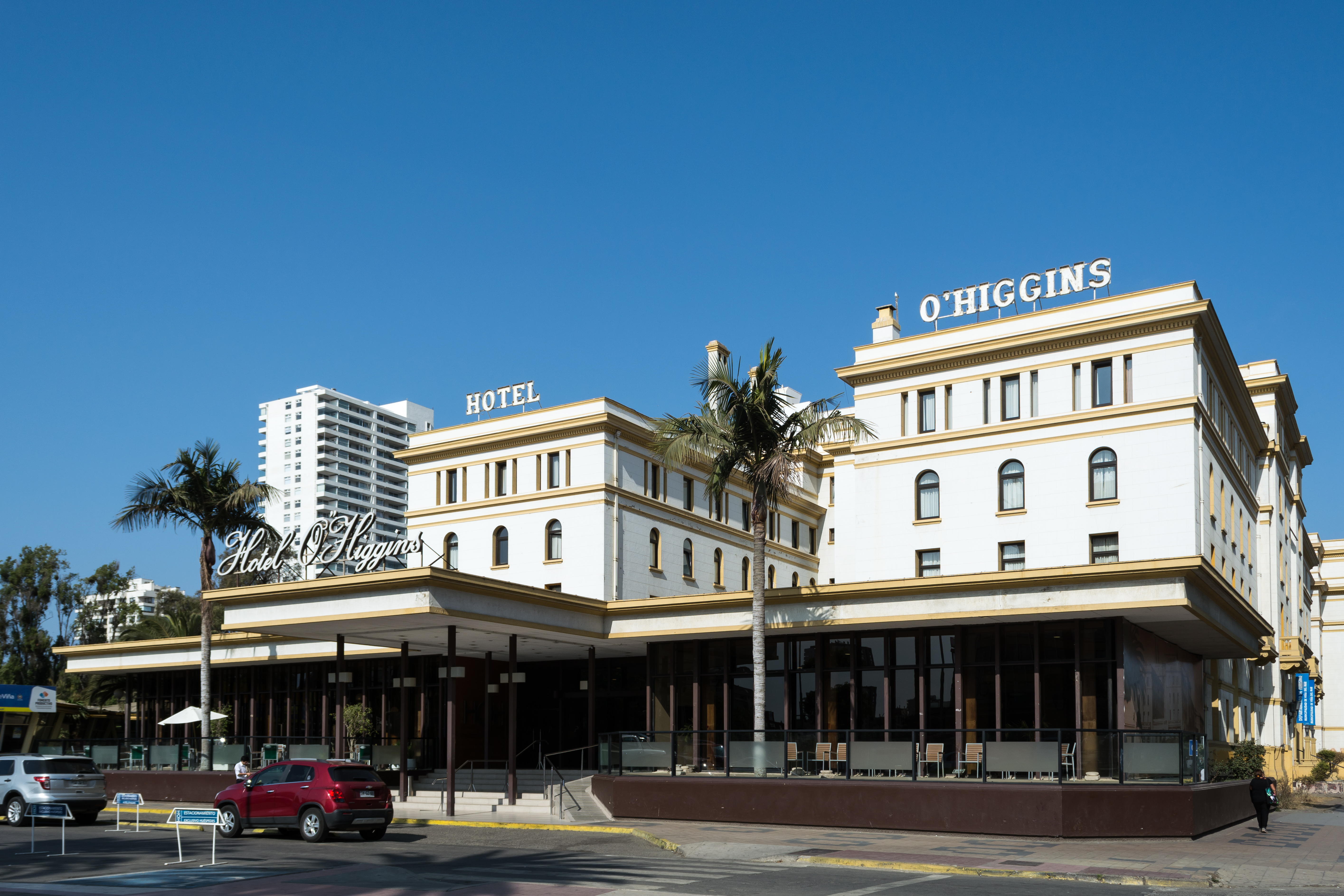 Hotel O'Higgins, Viña del Mar, Región de Valparaíso, Chile